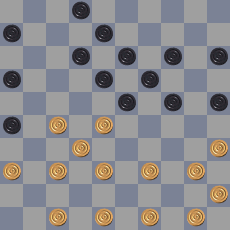 Zelfgemaakt diagrammetje